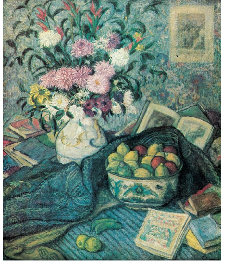 “Florero con plátanos, limones y libros”, Juan Echevarría (1875-1931) euskal margolari fauvistaren lana.